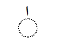 Das "hochgestellte Alif", ein arabisches Schriftzeichen. Der punktierte Kreis zeigt die Position des zu vokalisierenden Konsonanten an.